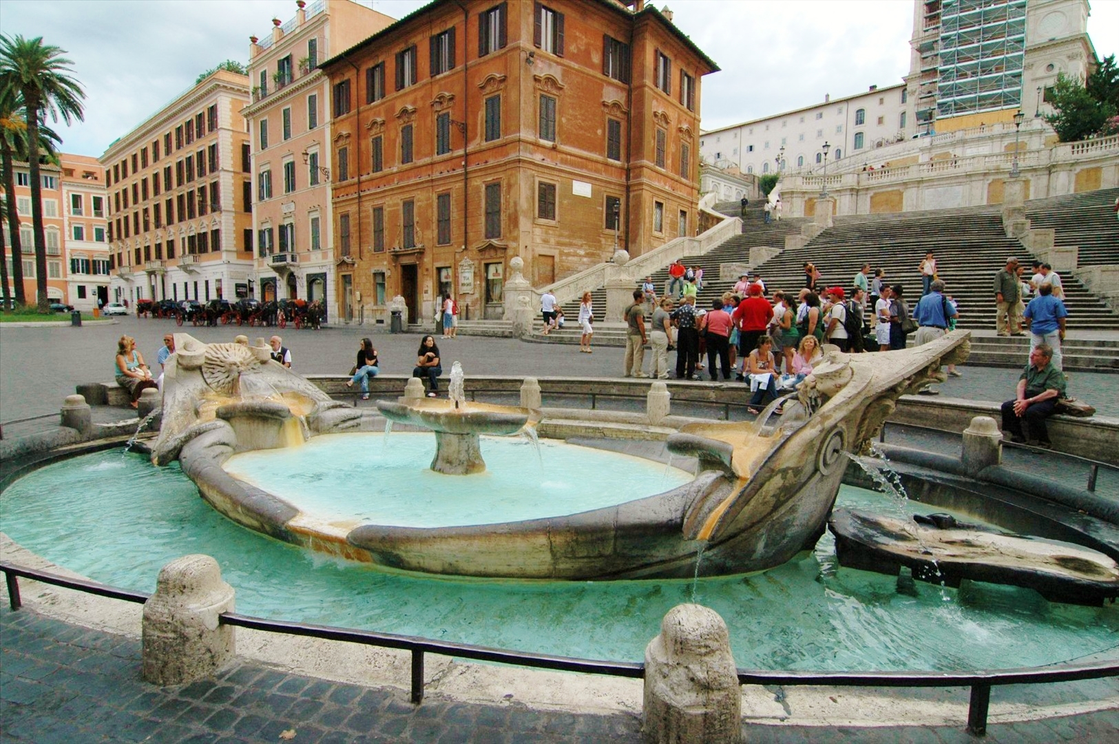 Fontana della Barcaccia laterale